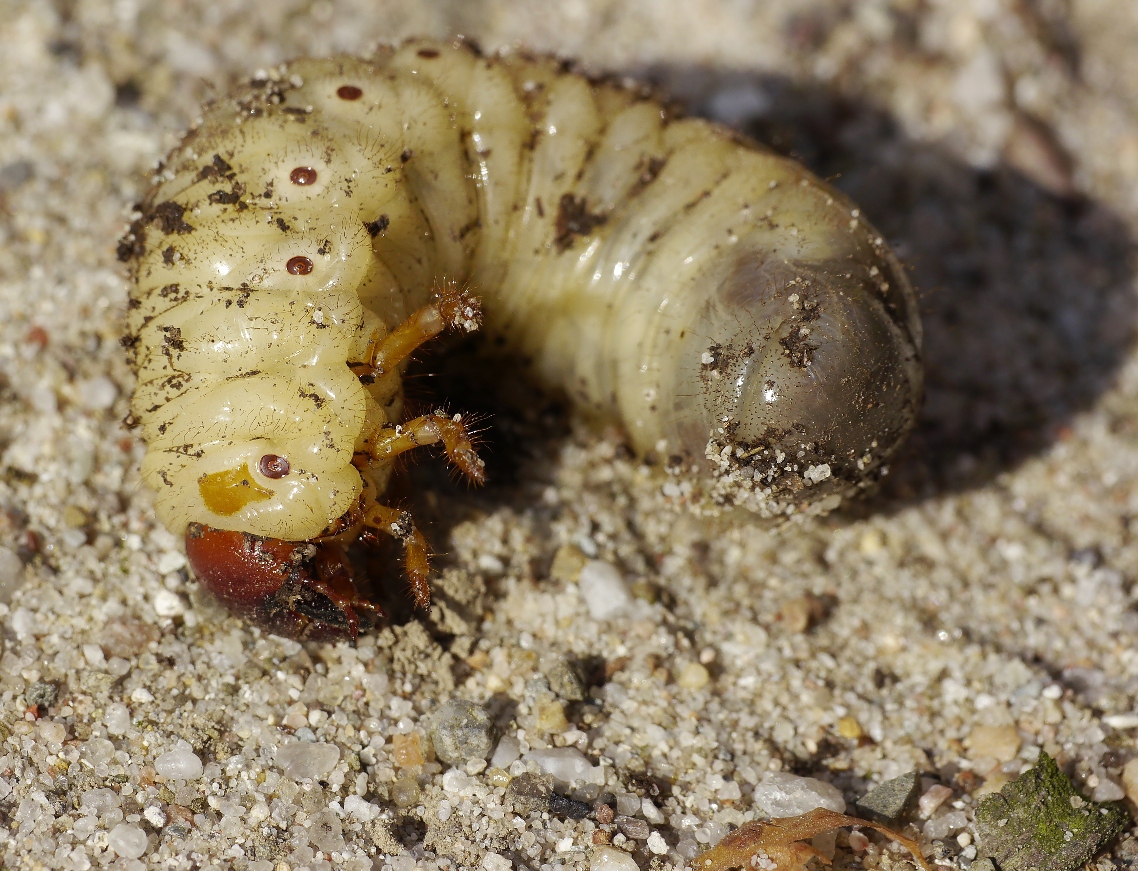 Nashornkäfer - Oryctes nasicornis, Larve. Aufgenommen in Eilenburg-Ost, Sachsen, Deutschland.